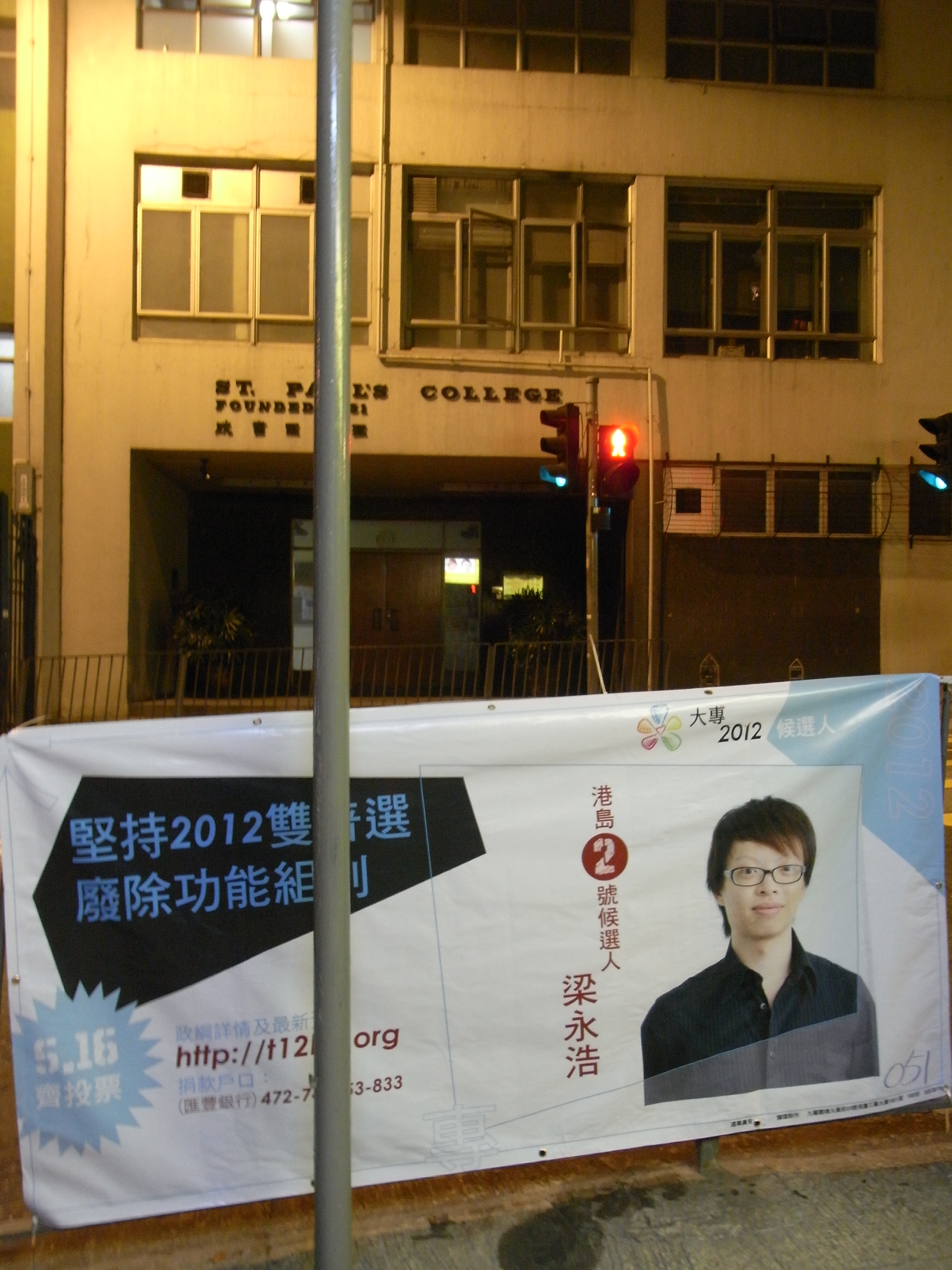 中文（香港）: 梁永浩